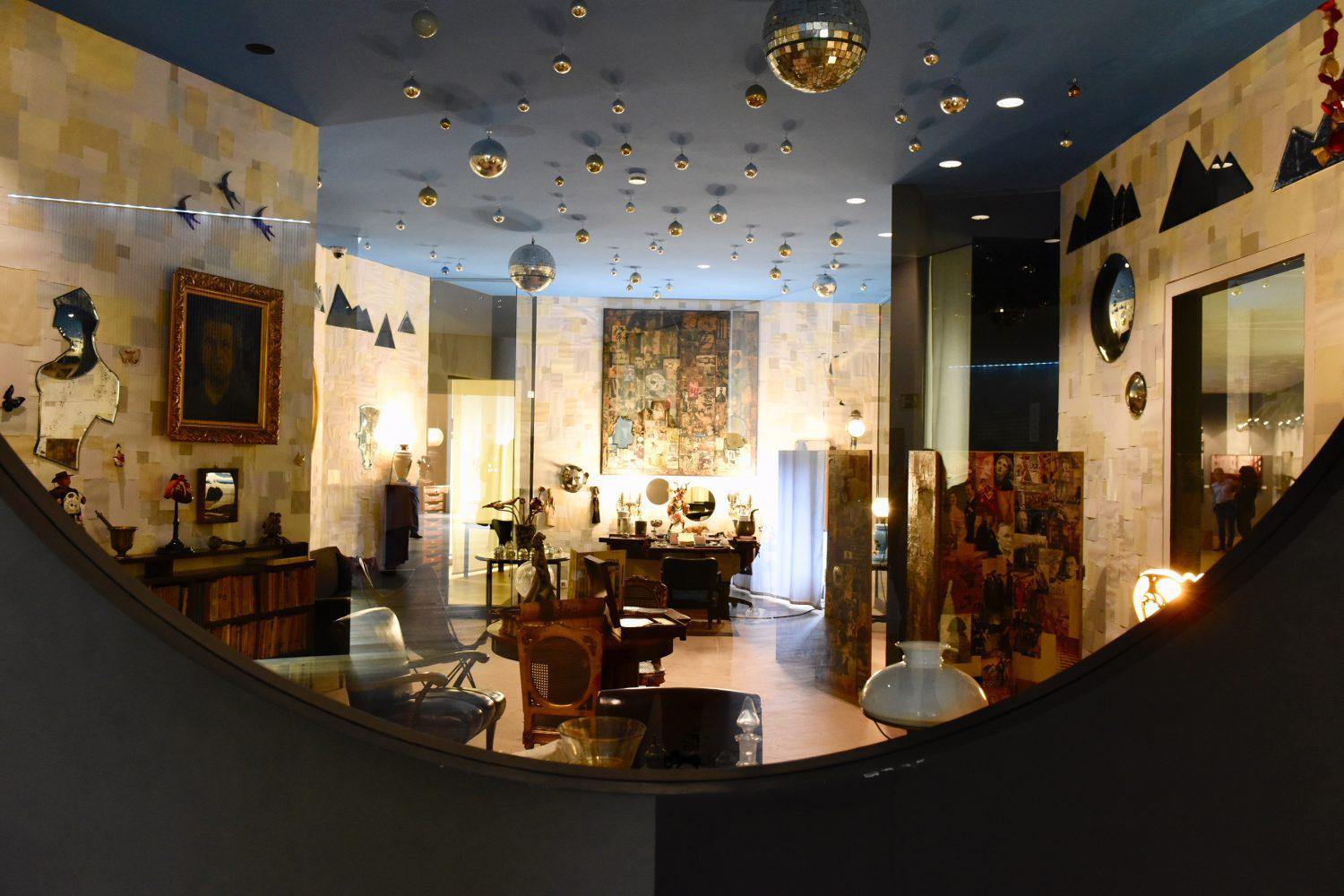 Manuela Carmena, alcaldesa de Madrid, acompañada por el director de Turismo, Miguel Sanz, ha recorrido hoy sábado tres de los hitos incluidos en Mira Madrid, un programa de actividades para descubrir espacios sorprendentes de la ciudad no del todo conocidos por los propios madrileños ni por los visitantes.